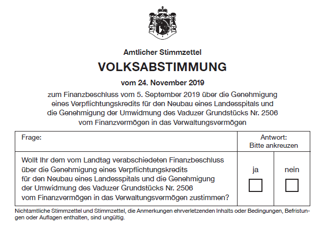 Bulletin de vote utilisé lors du référendum Liechtensteinois de 2019